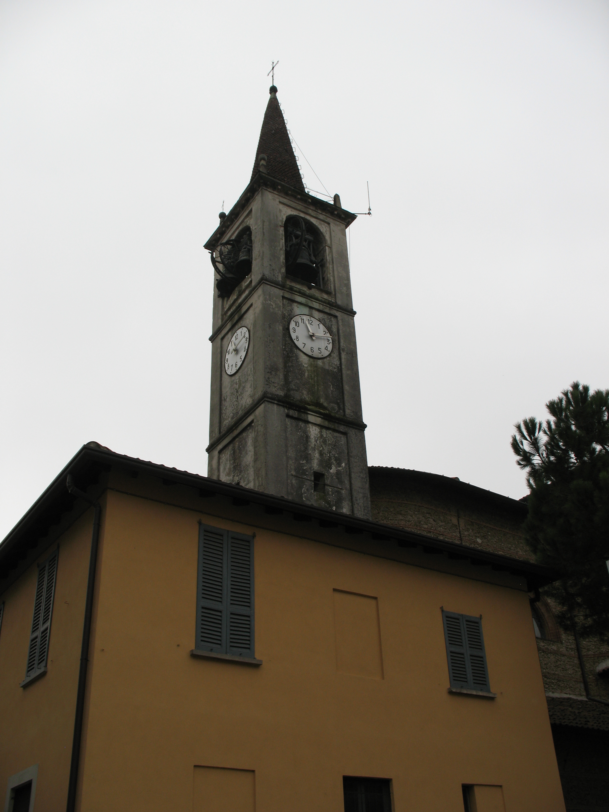 torre campanaria del XV secolo